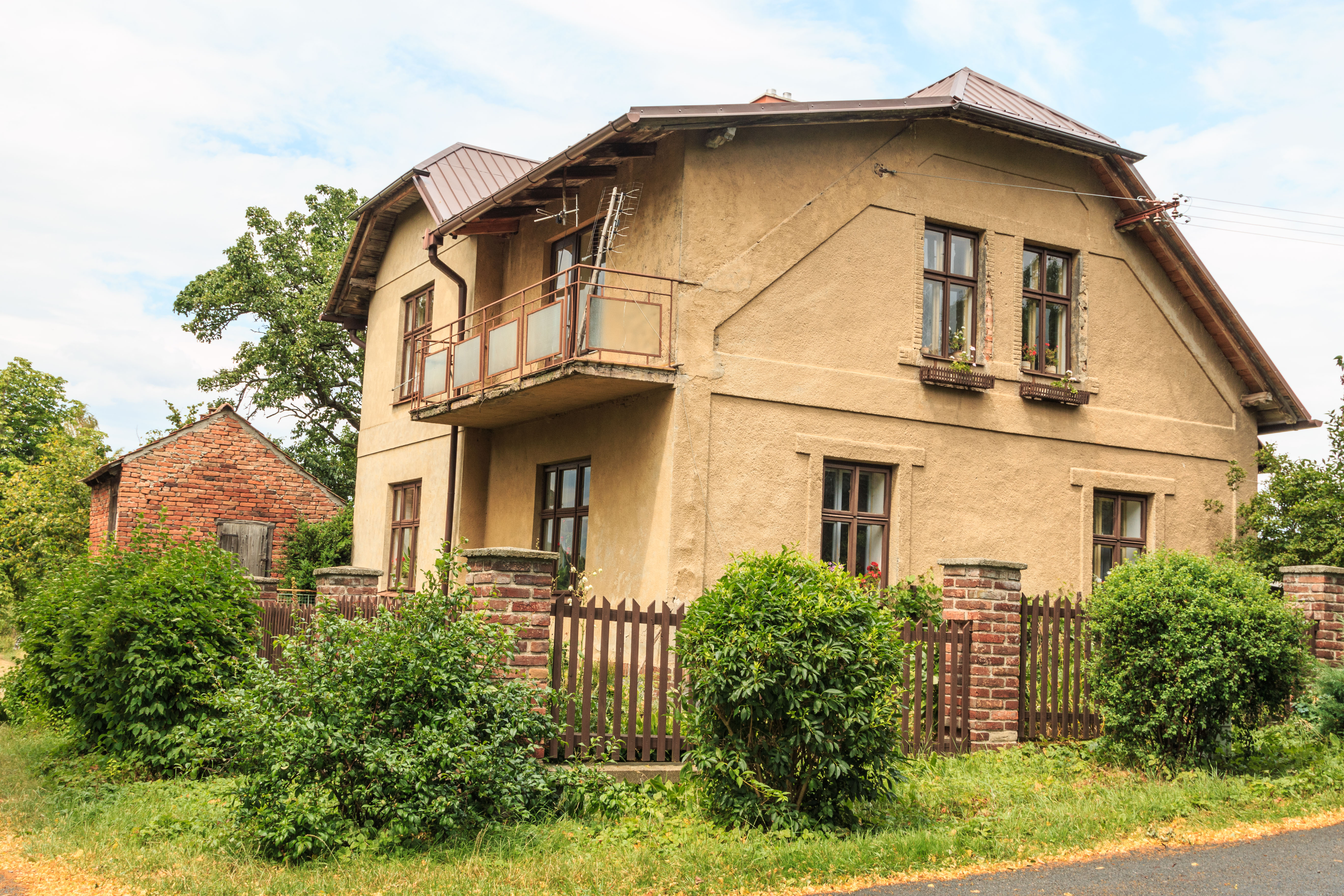 Otáňka čp. 10